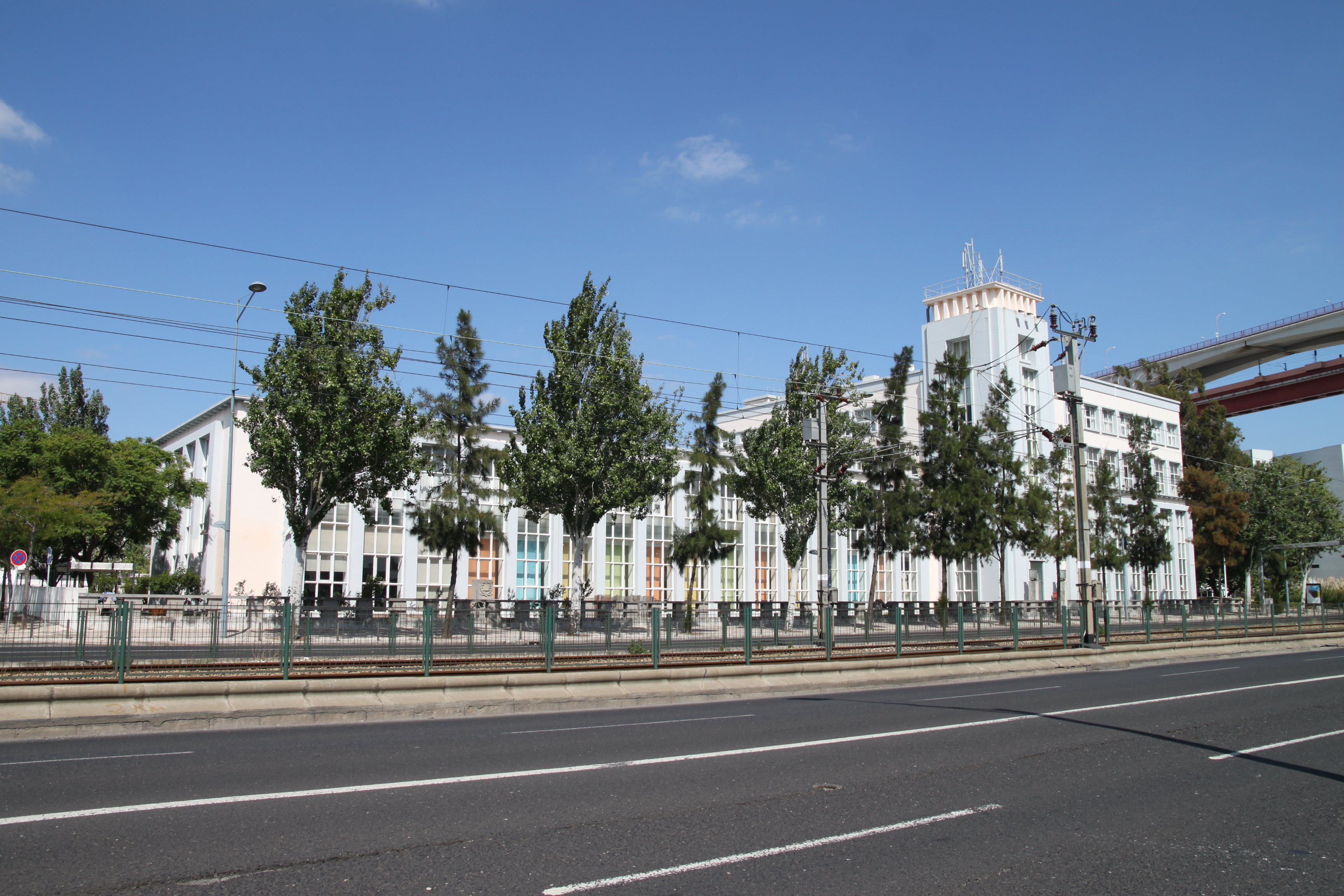 Standard Eléctrica This file was uploaded for Wiki Loves Monuments in Portugal with the unique identifier 74414.